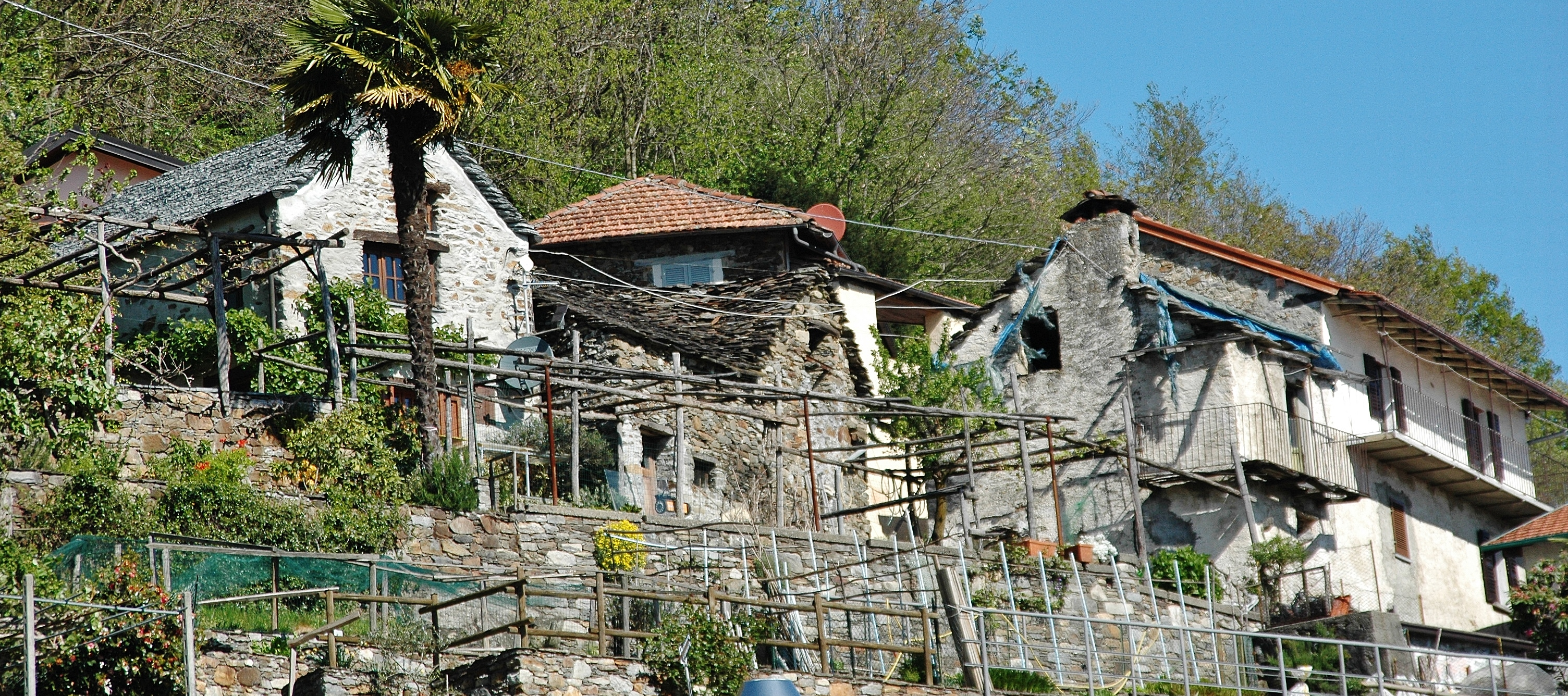 Houses at Sant'Agata